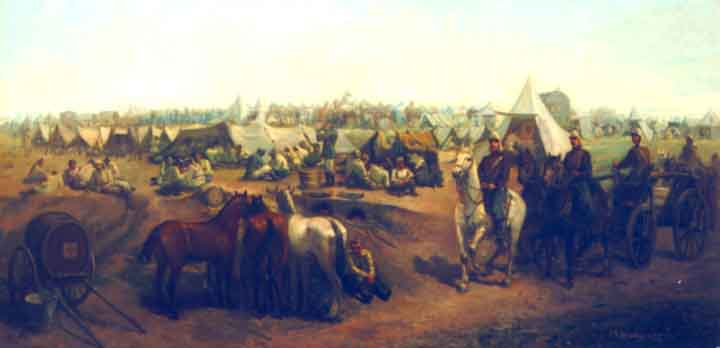 Bivuac. Compoziţie amplă care surprinde tabăra armatei române în timpul războiului de la 1877. În prim plan stânga, un butoi cu însemnul crucii, montat pe o căruţă. Alături, trei cai vazuţi din spate din care doi sunt bruni şi unul alb, lângă care se află un tânăr. În dreapta prim-plan, un convoi de căruţe în fruntea cărora merge un ofiţer călare pe un cal alb. În plan îndepărtat, o mulţime de corturi înşirate şi cai văzuţi din spate. În corturi şi în jurul acestora, grupuri de soldaţi aşezaţi pe pământ la odihnă. Desen riguros. Cromatic - verde-ocru şi brun-roşcat. Semnat şi datat dreapta jos, cu ocru: S.Henţia, 1877. Complexul Muzeal Naţional "Moldova" - IAŞI - Muzeul de Artă